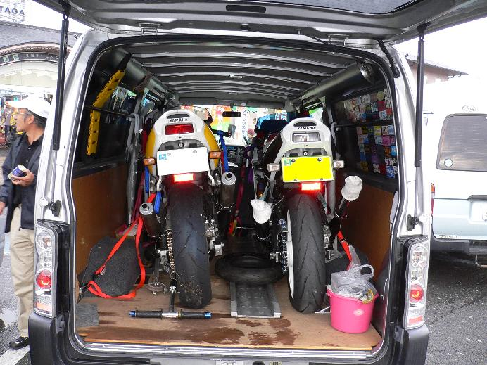 自己所有車